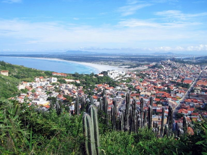 Arraial do Cabo, Rio de Janeiro, Brasil.